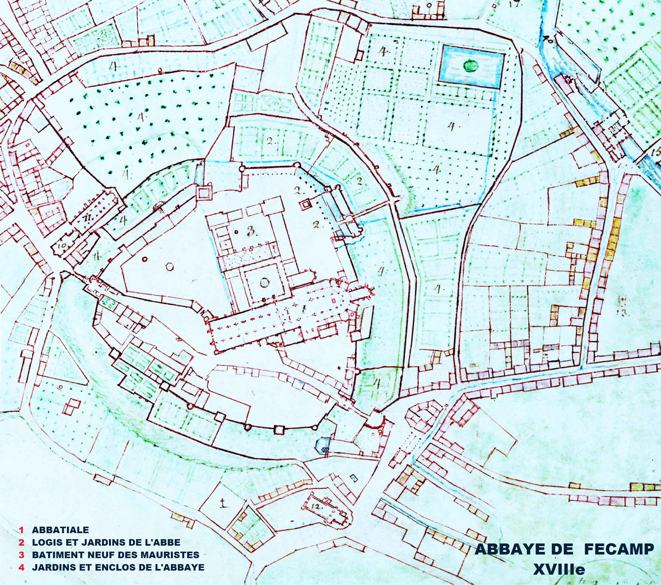 Abbaye de Fécamp, Plan de la forteresse (image du domaine public modifiée (de Brilly)